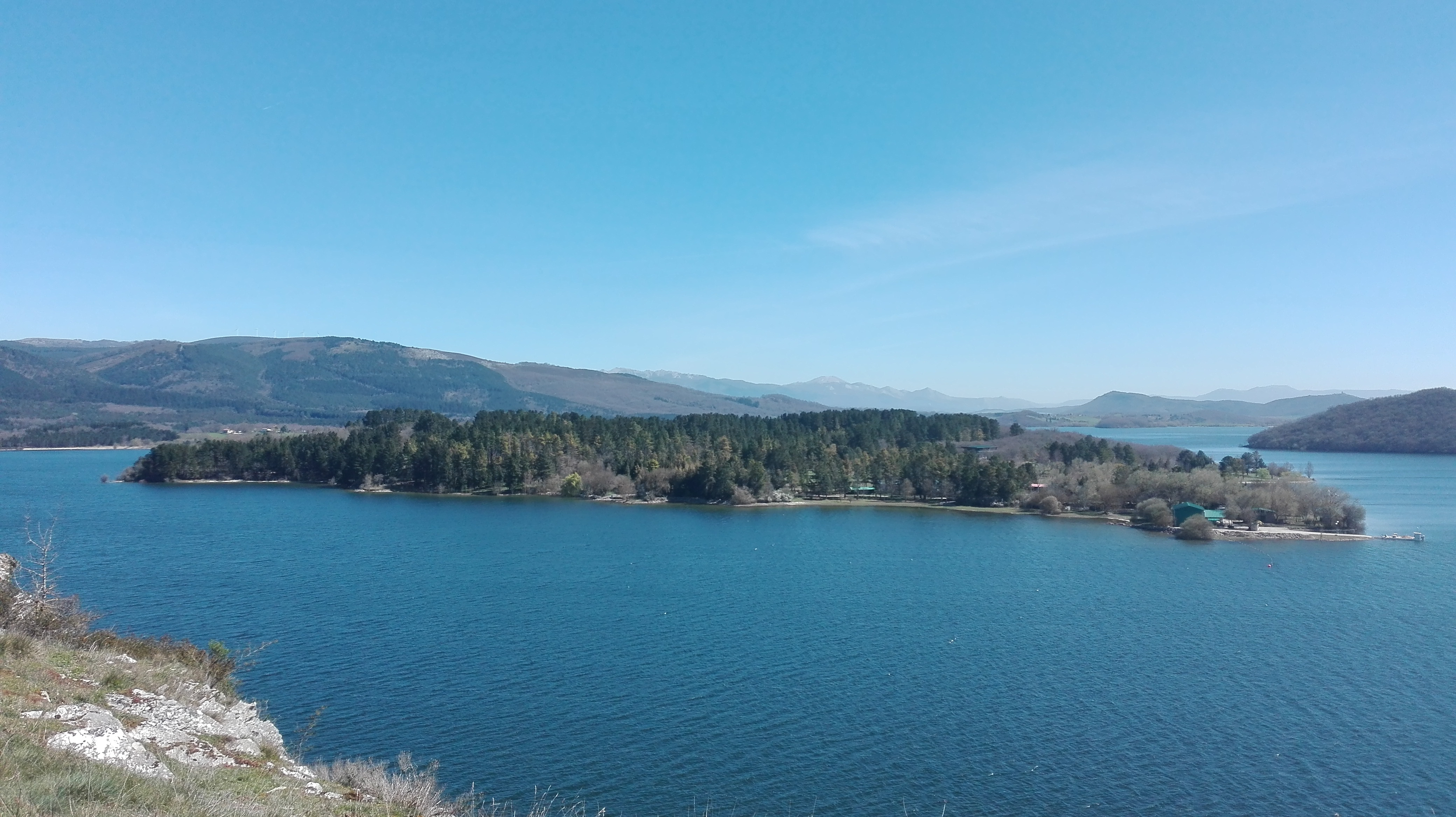 Zuhatza uhartea San Juan puntatik ikusita